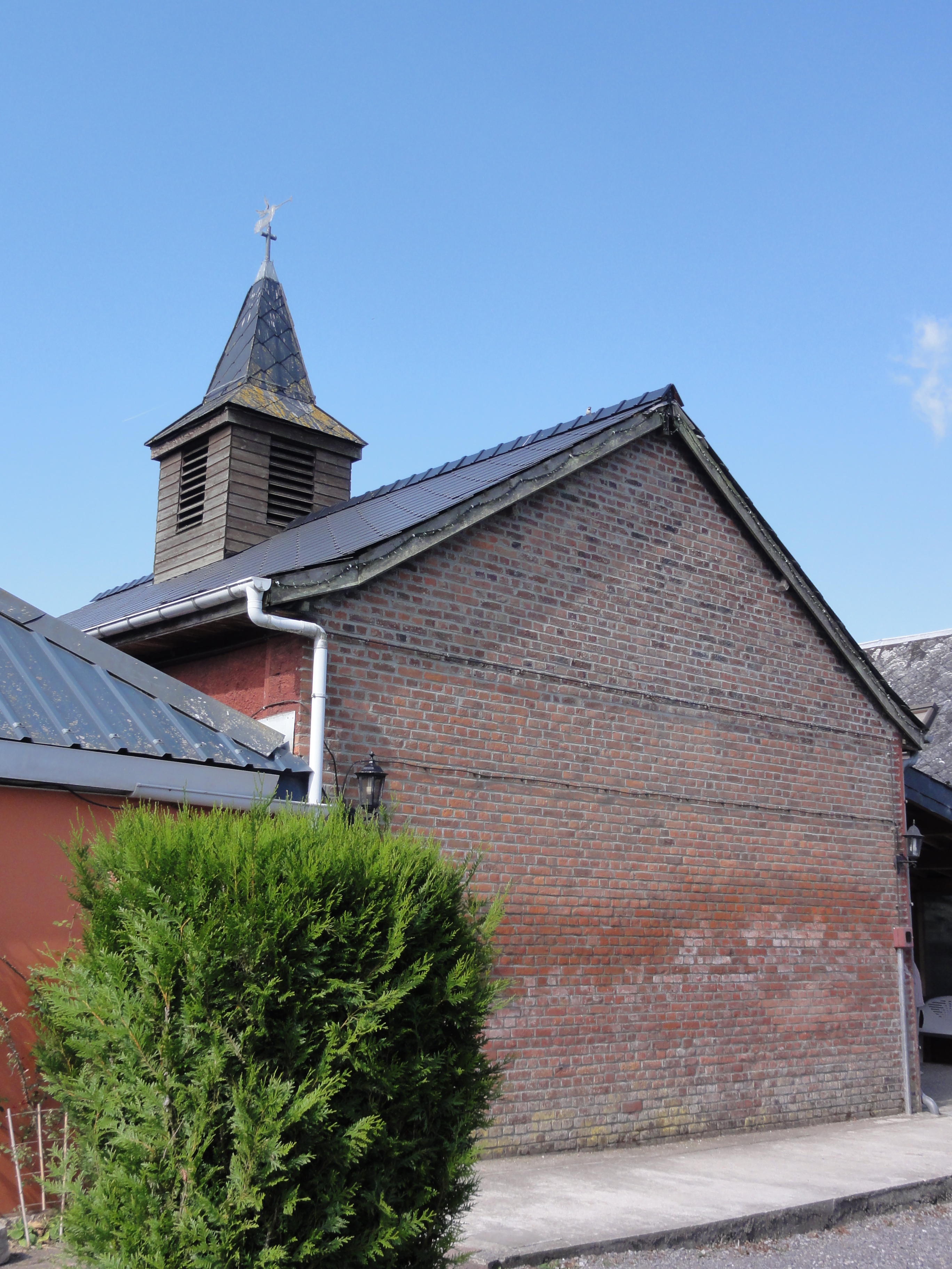 Prisches (Nord, Fr) N. D. de Prisches, (anciens-catholiques)